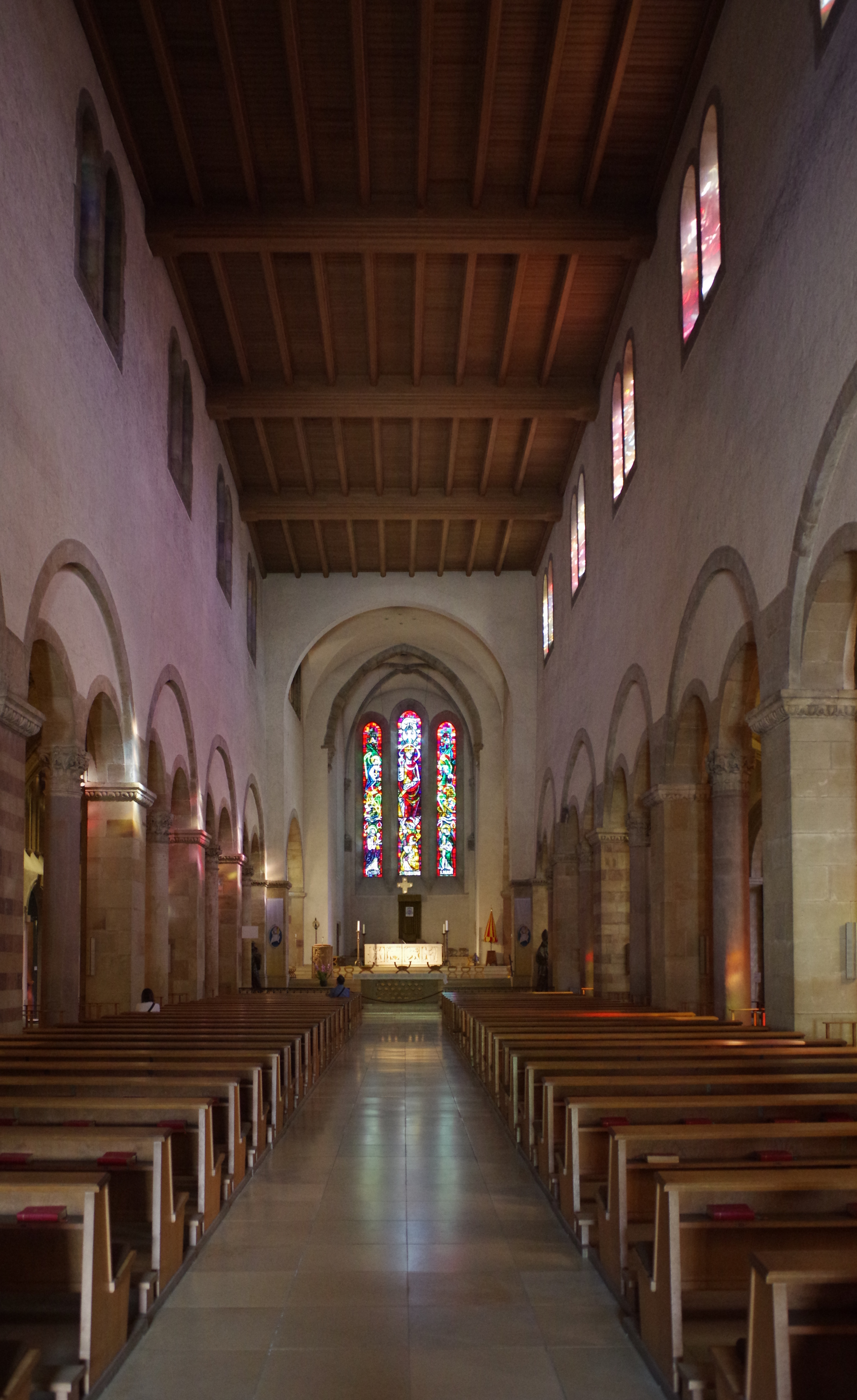 Luxemburg, Echternach, St. Willibrord Basilika